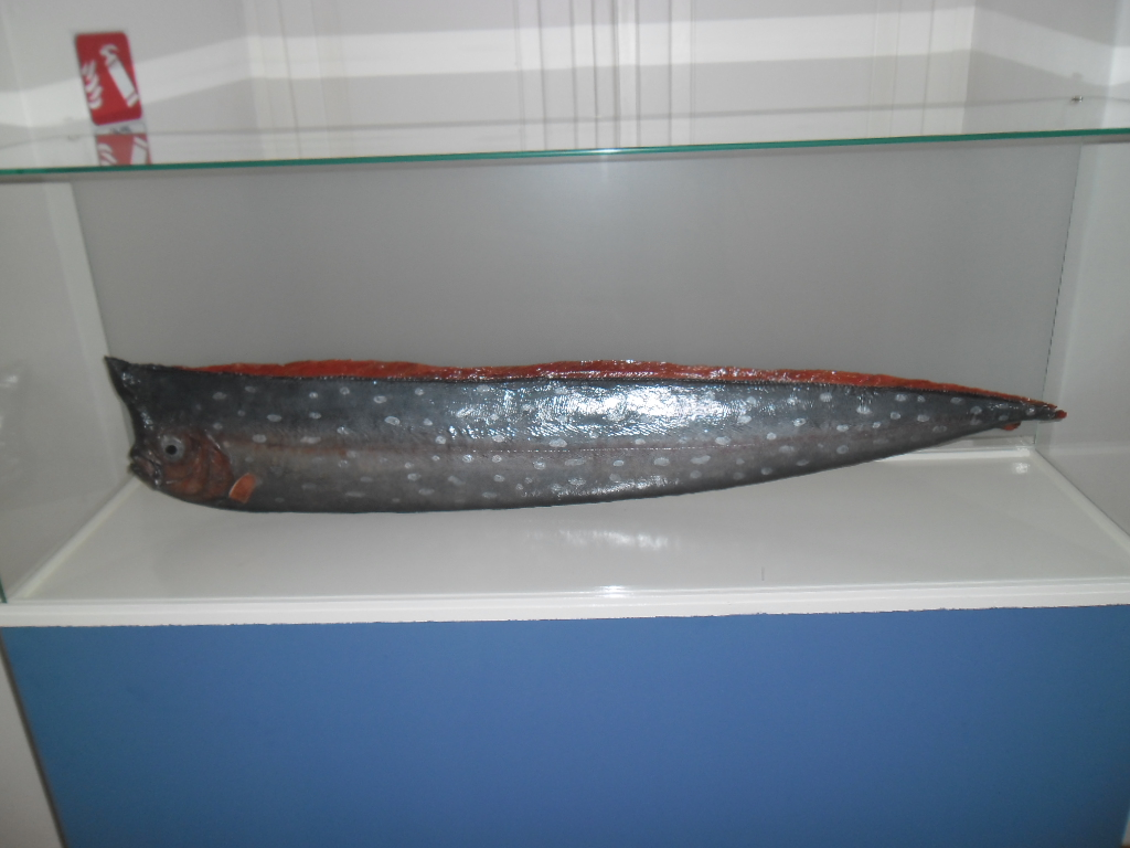 jedroglavka, dubrovački prirodoslovni muzej